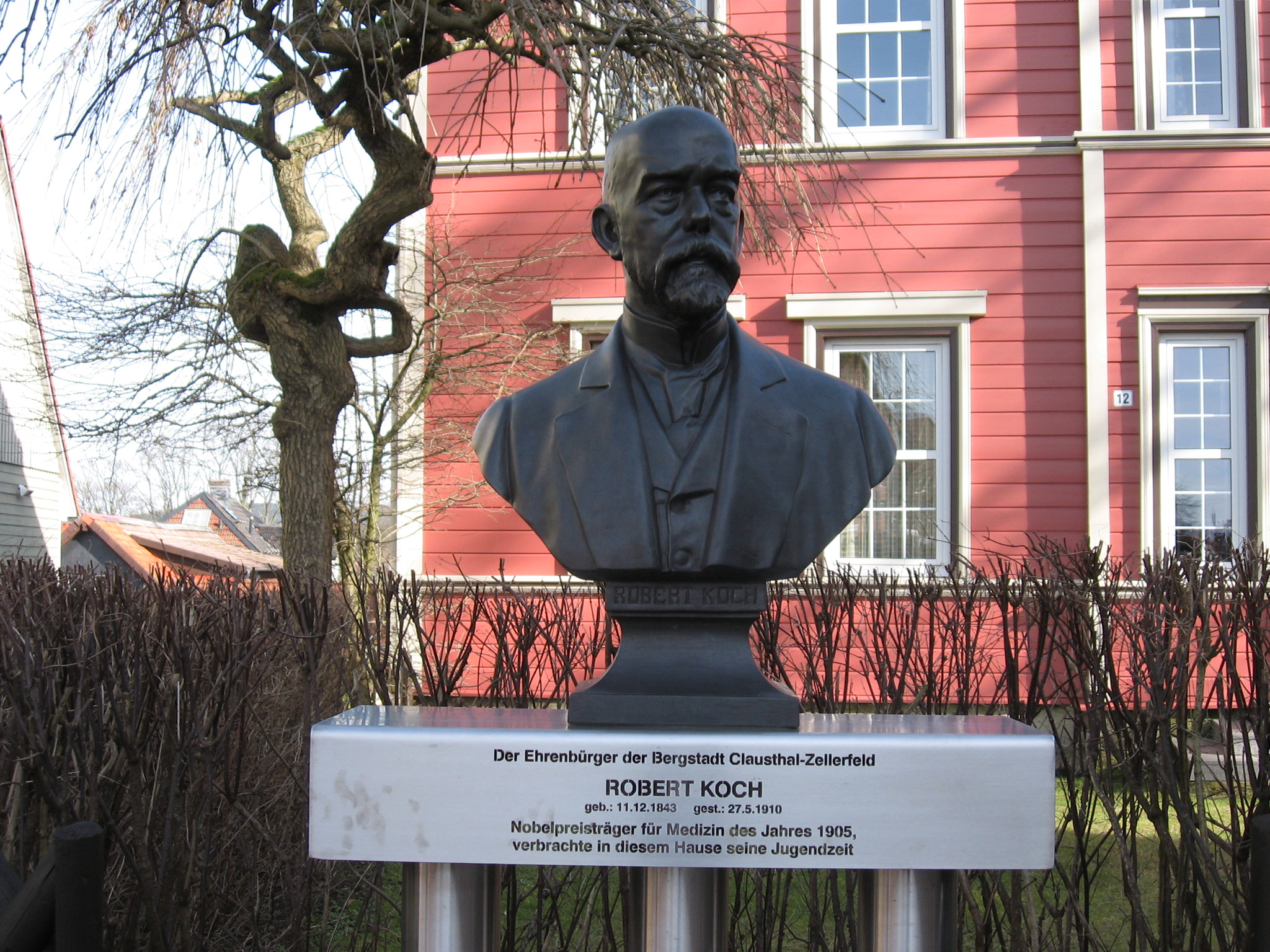 Büste von Robert Koch vor dem Haus seiner Jugendzeit in Clausthal-Zellerfeld.